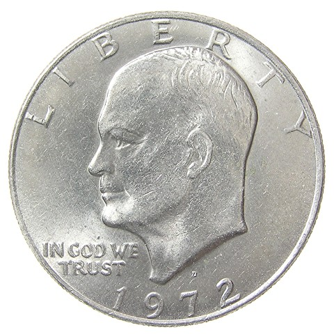 a 1972-D copper-nickel Eisenhower dollar